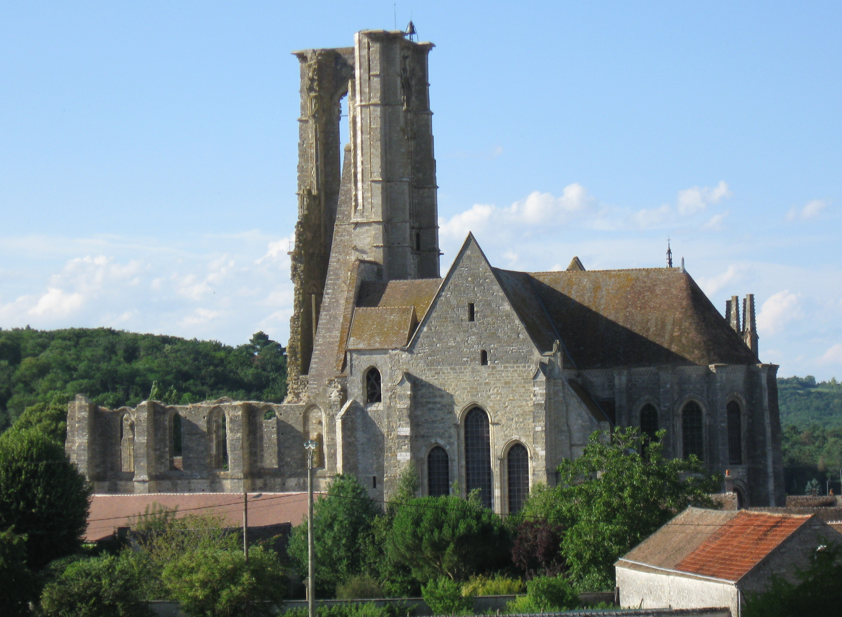 Église Saint-Mathurin de Larchant. (Seine-et-Marne, région Île-de-France).